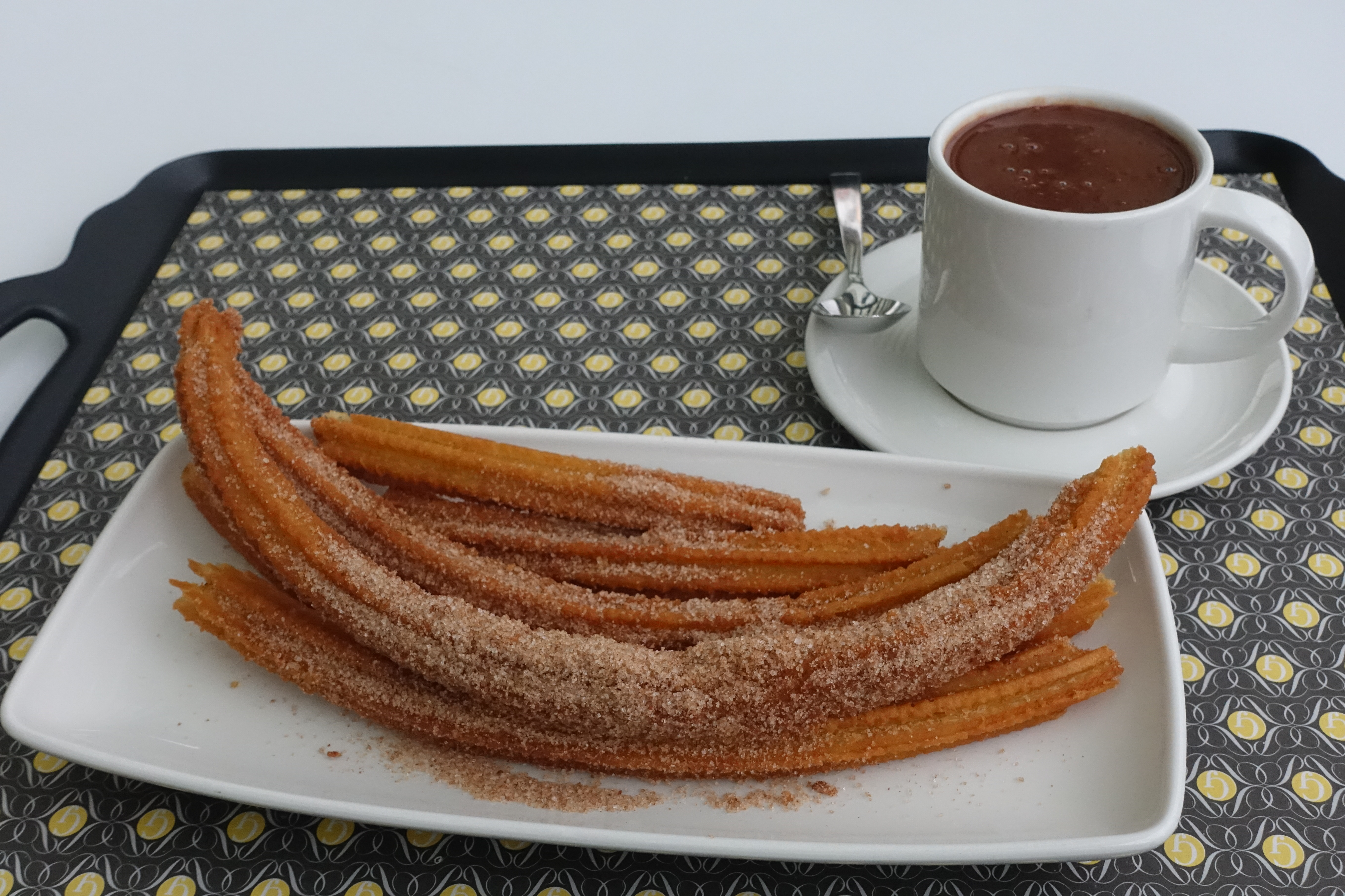 Churros con chocolate, en México.